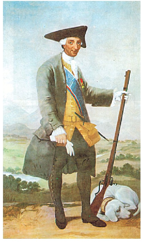 Espainiako errege Karlos III.a ehizarako jantzita, Goyaren koadro batean.